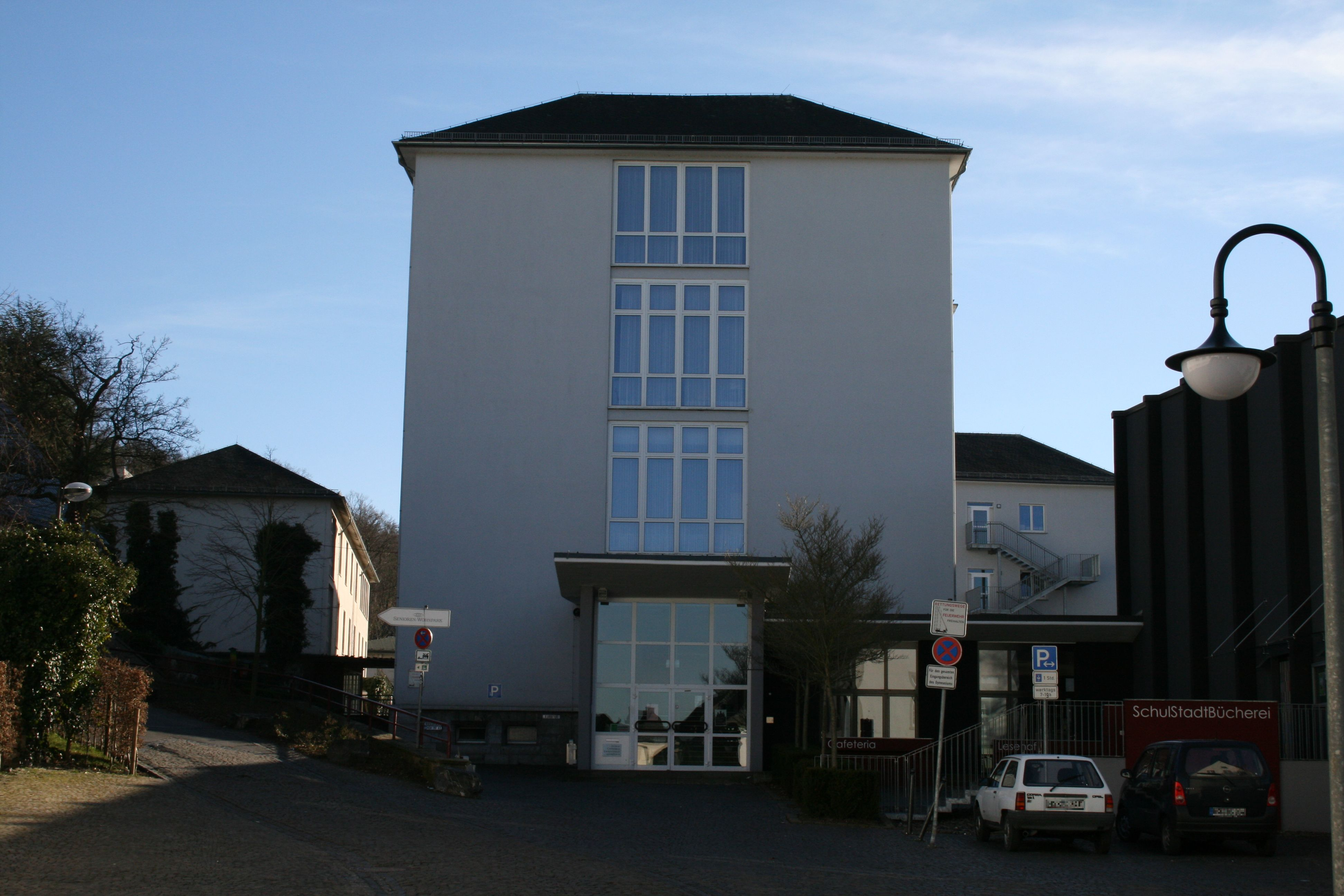 Laurentianum